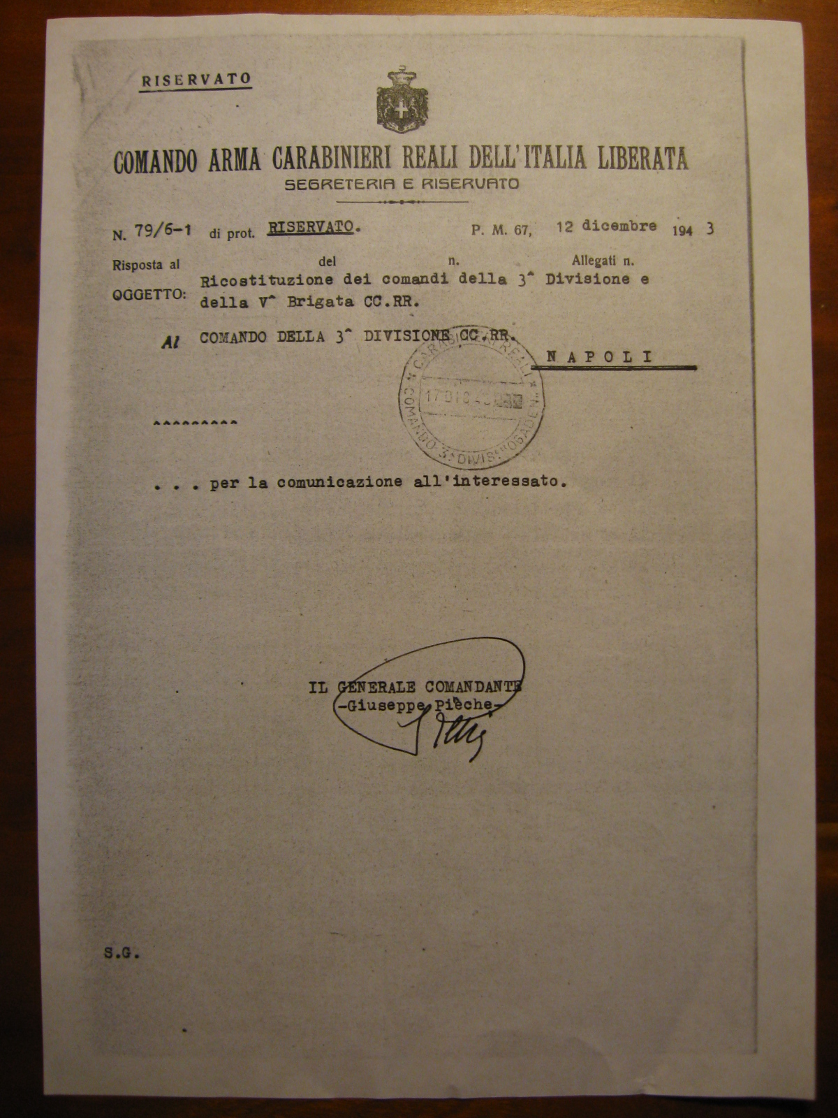 Documentazione Caserma Vittoria